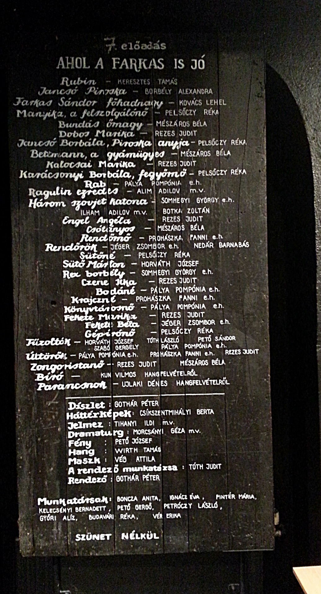 Katona József Színház (Kamra) „Ahol a farkas is jó“ című előadás színlapja. Budapest V. kerület, Ferenciek tere.